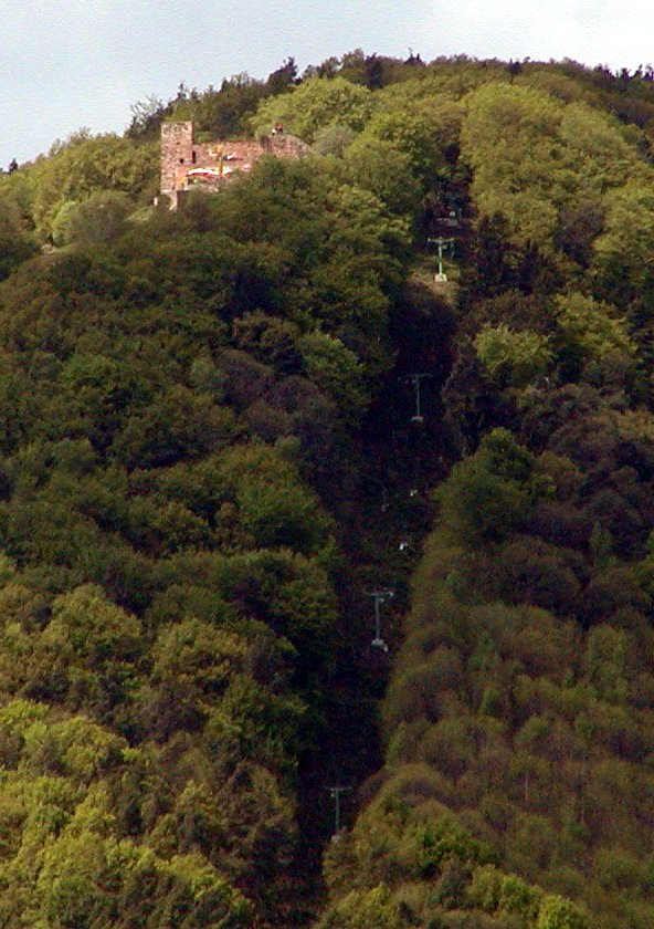 Die Rietburg bei Rhodt. Quelle: selbst fotografiert und unter die GFDL gestellt